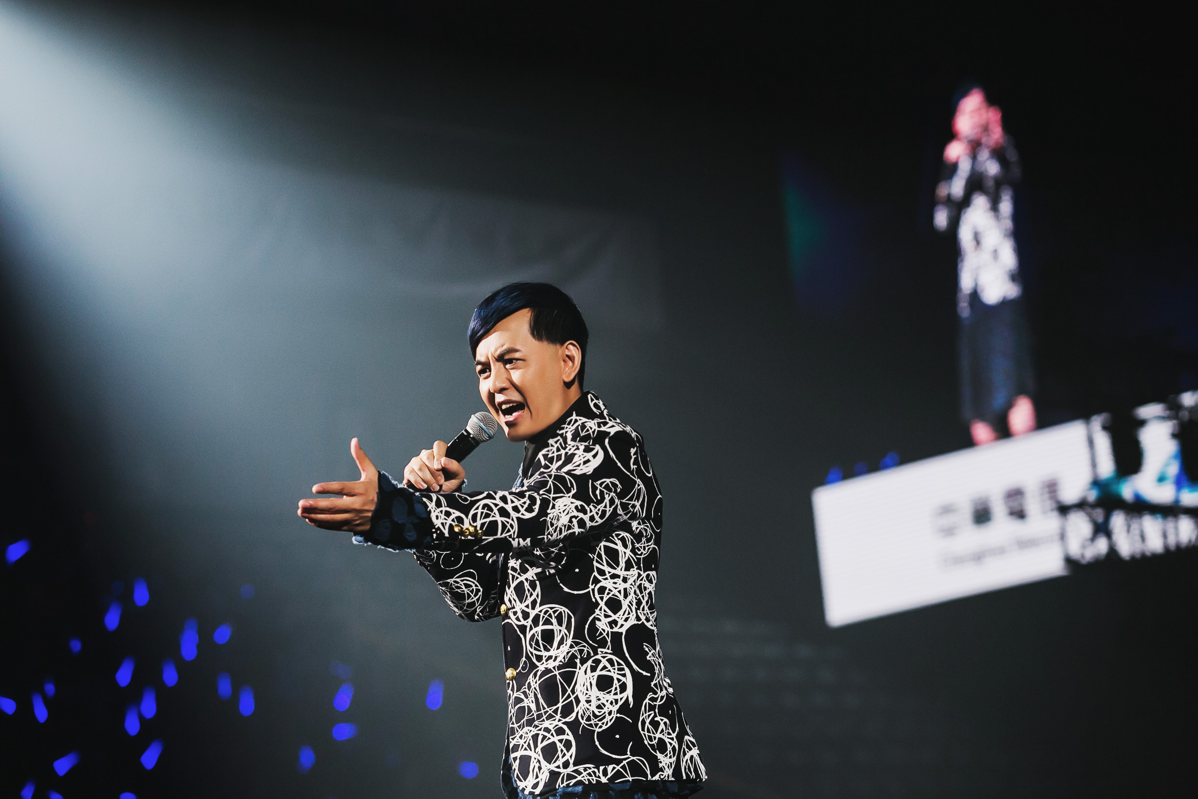 中文（台灣）: KKBOX風雲榜歷屆主持人－黃子佼